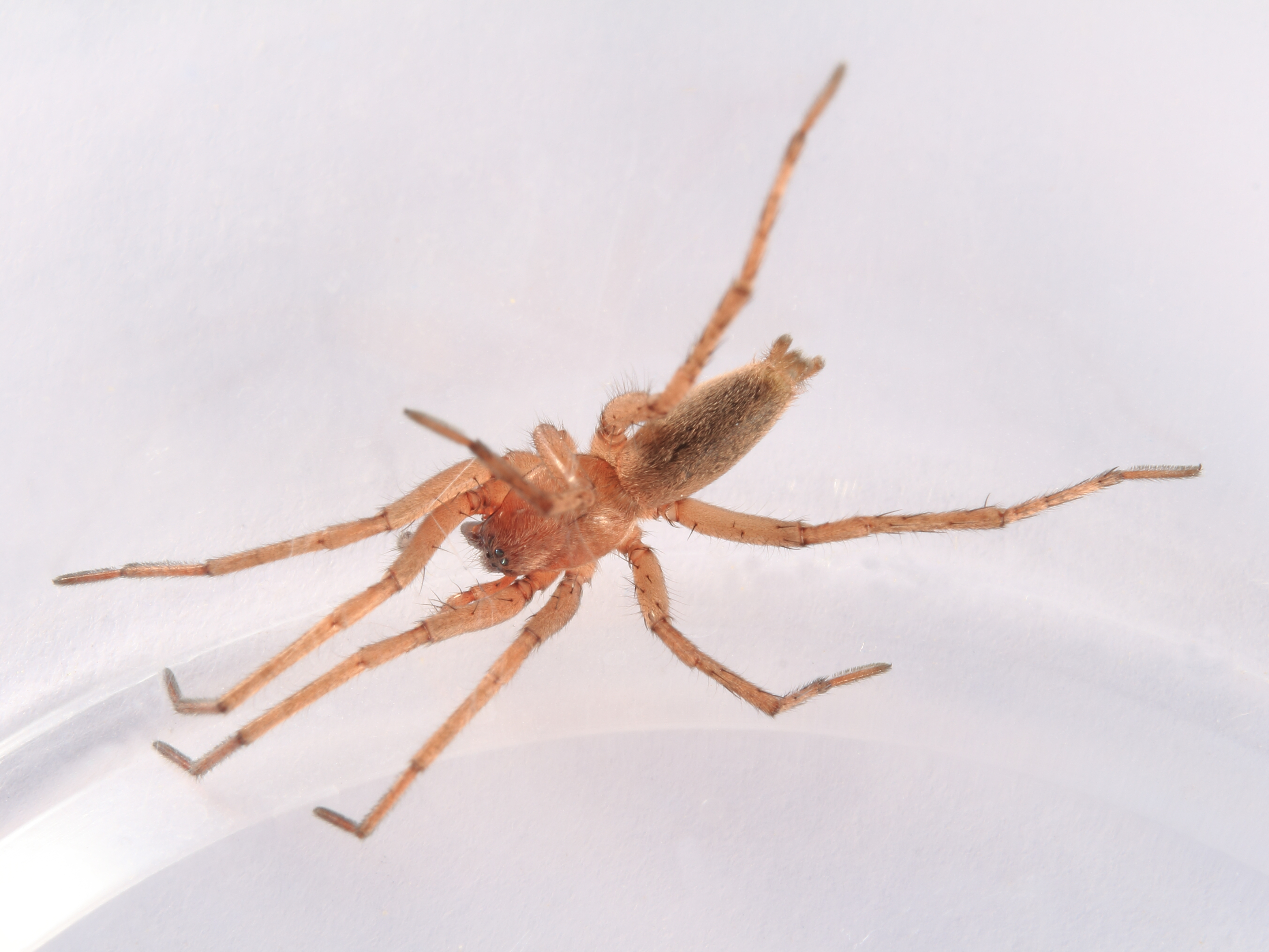 Drassodes vermutlich D. lapidosus, Körperlänge ca 8mm, gefunden im Garten Die abgebildete Spinne wurde am 7. Juni 2015 von Mhohner auf WP:RBIO/B bestimmt The spider shown here has been identified by Mhohner on WP:RBIO/B 2015, June 7th